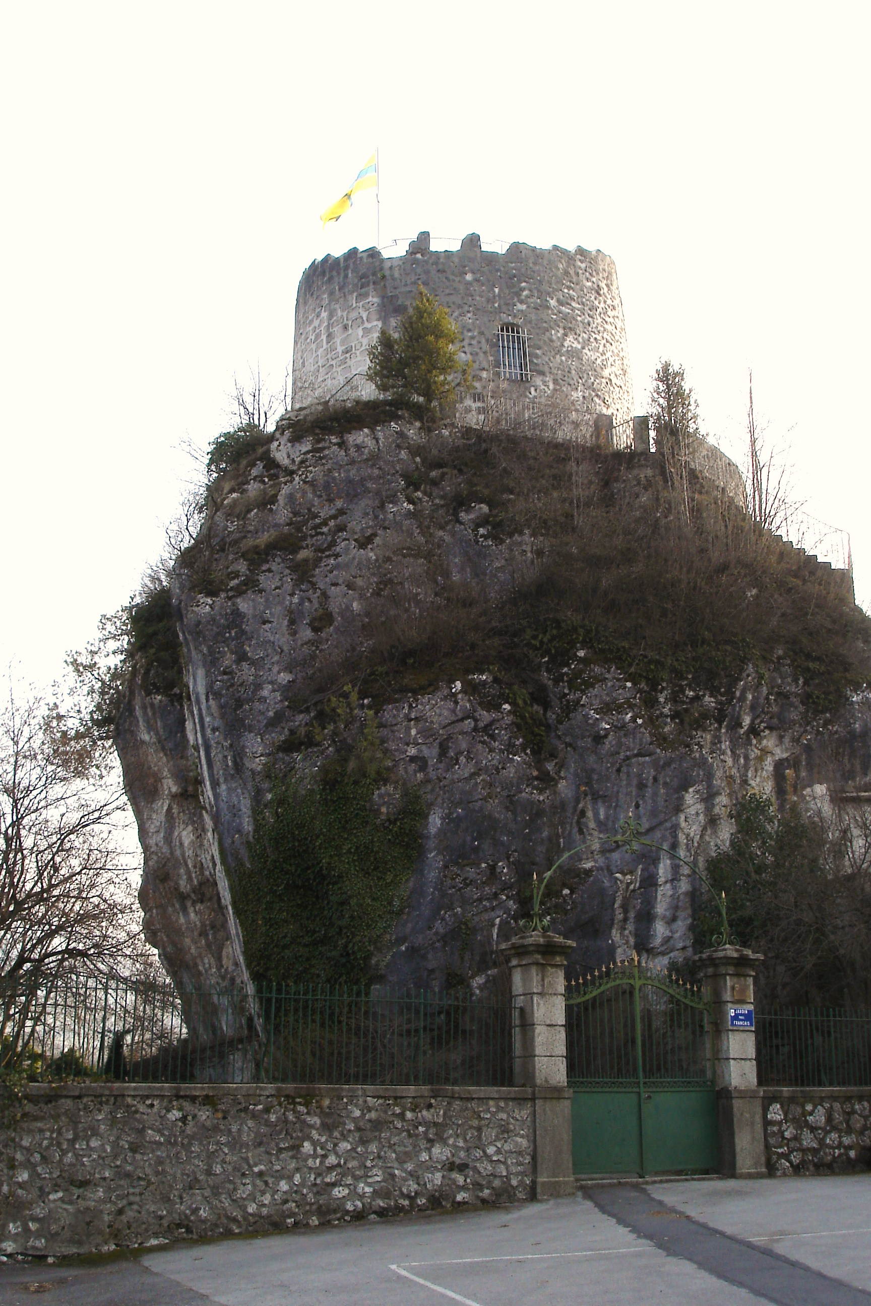 La tour des comtes de Genève à La Roche-sur-Foron en Haute-Savoie - France